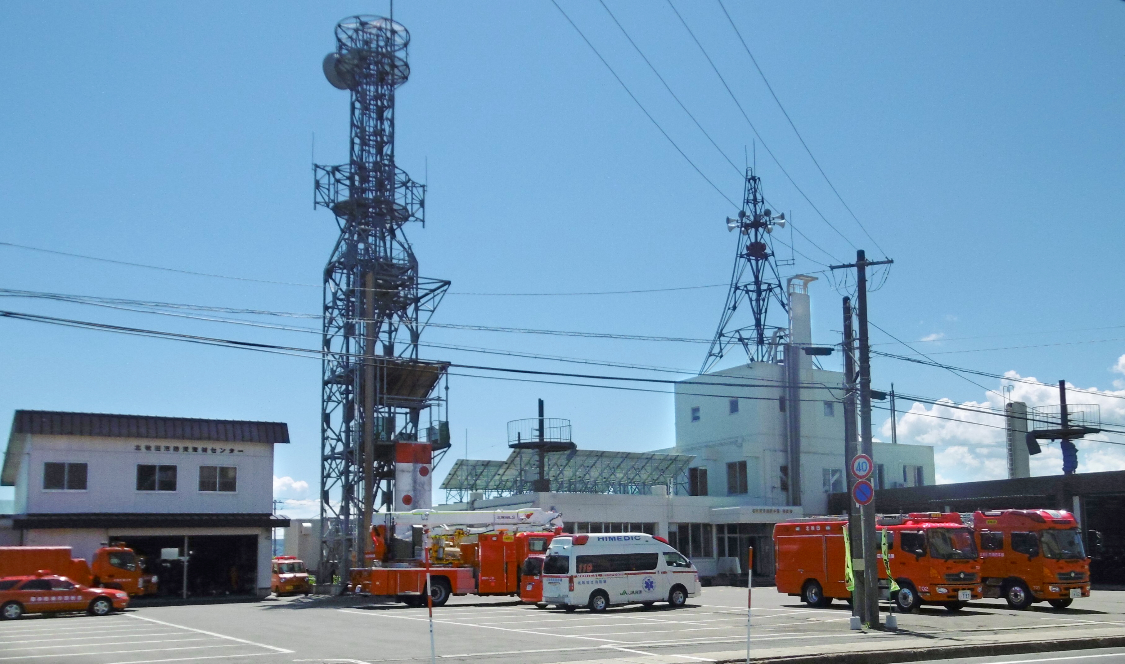 北秋田市消防本部